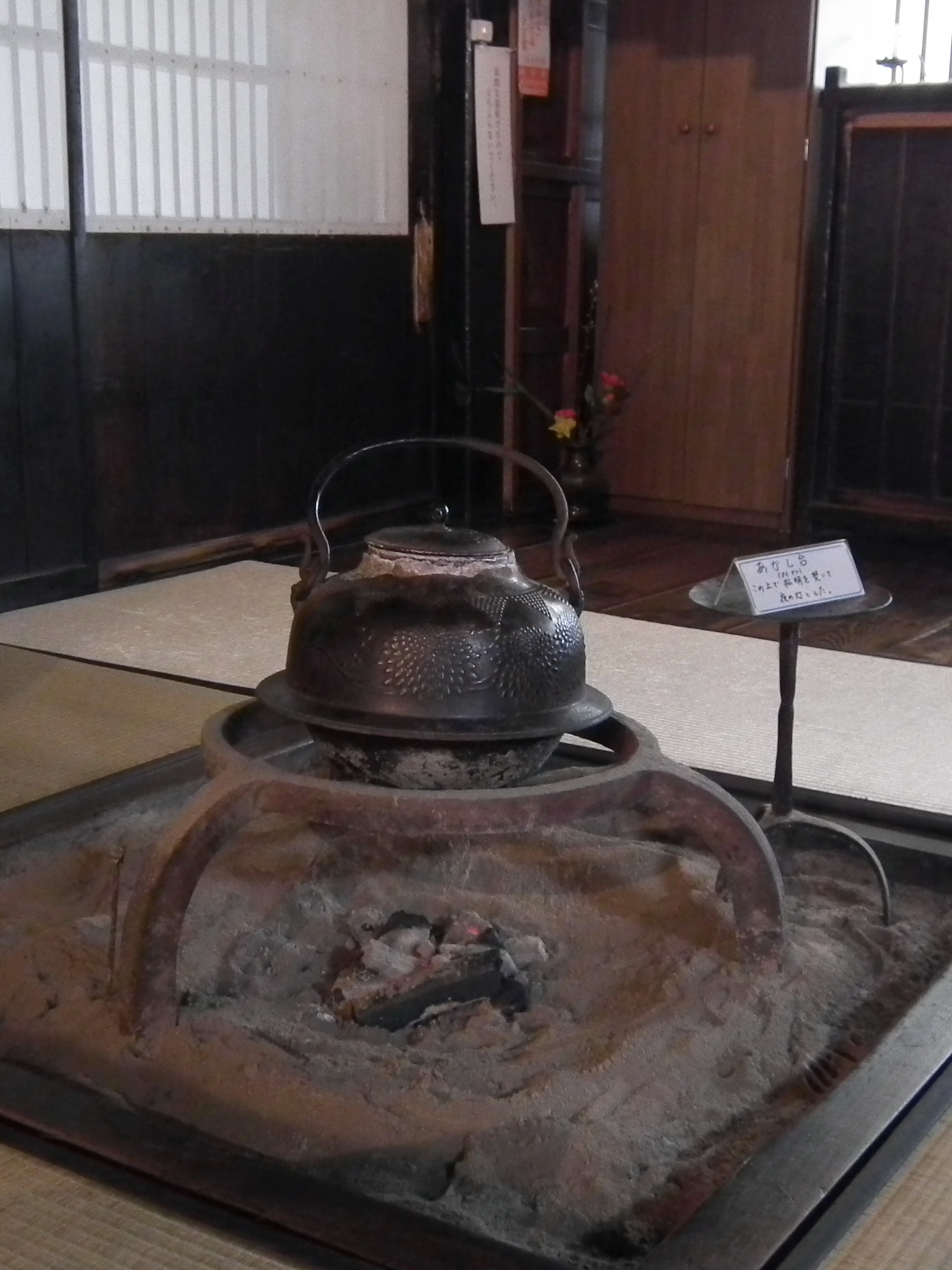 長瀨家 Nagase-ke